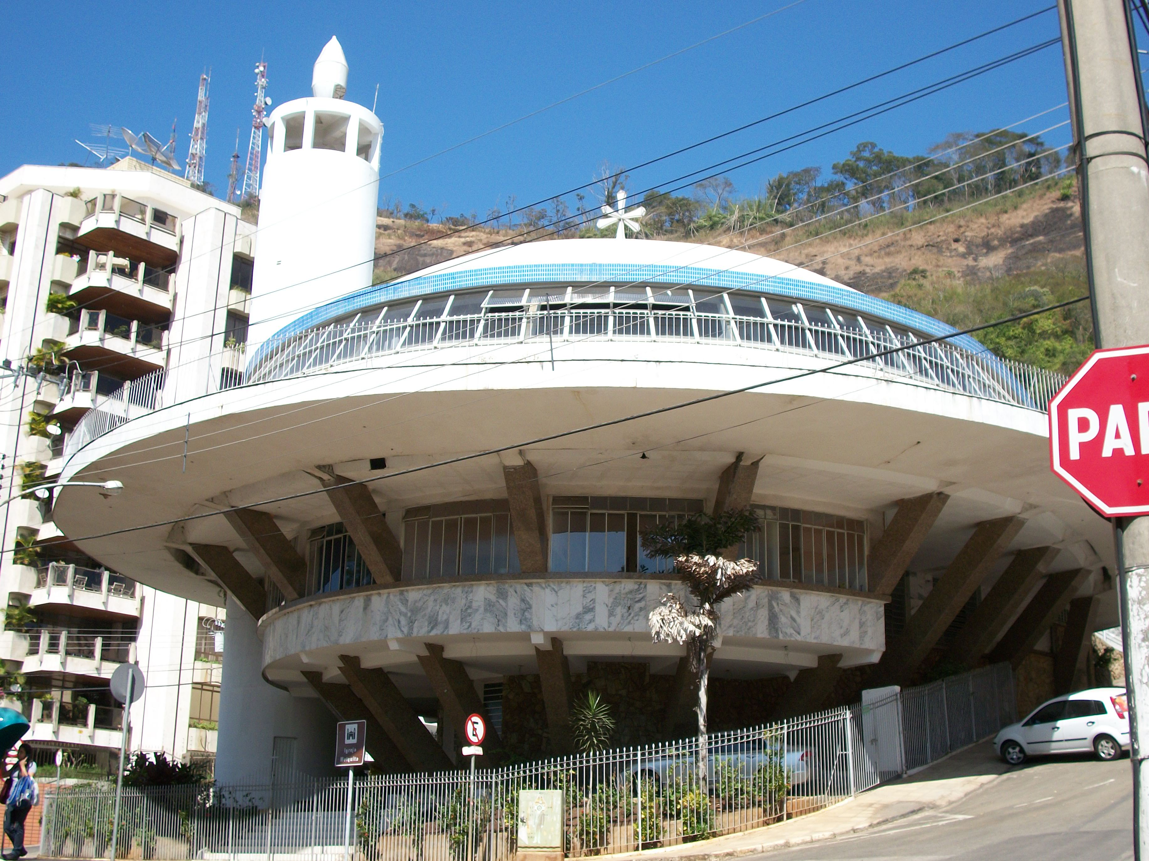 Igreja Greco-Melquita do bairro Santa Helena (Igreja de São Jorge (Juiz de Fora)). Cidade de Juiz de Fora - Minas Gerais - Brasil